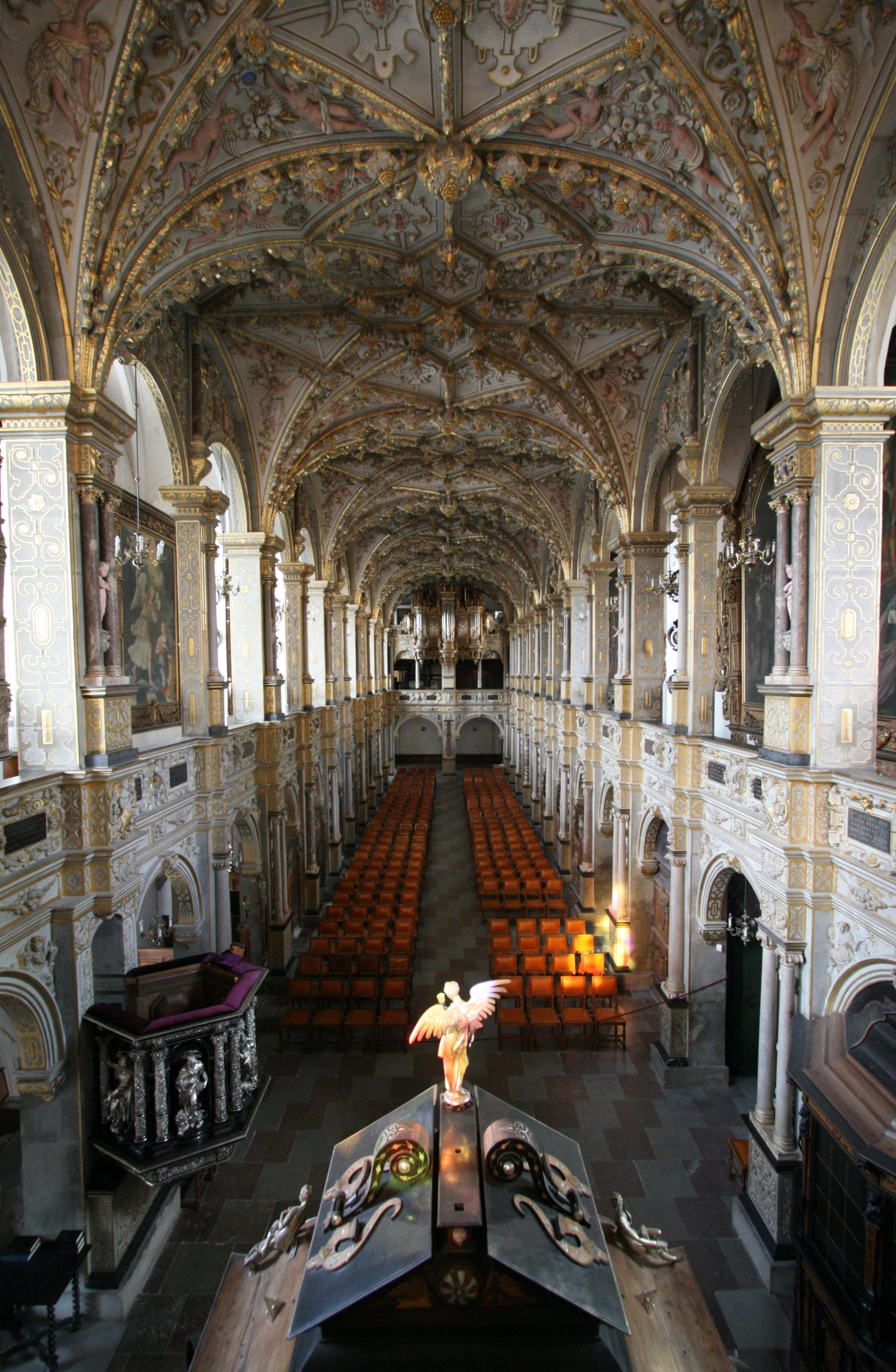 Frederiksborg Slotkirke, Hillerød, Denmark. Interior from the gallery behind the altar. Portrait format, wide angle.